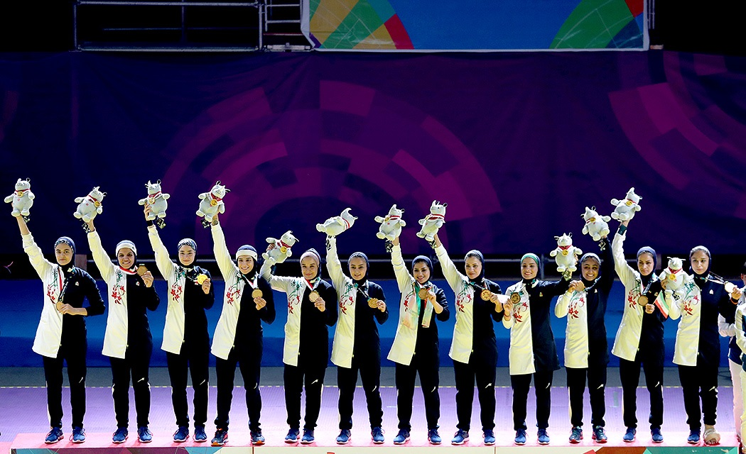 تیم ملی کبدی زنان ایران در بازیهای آسیایی جاکارتا ۲۰۱۸